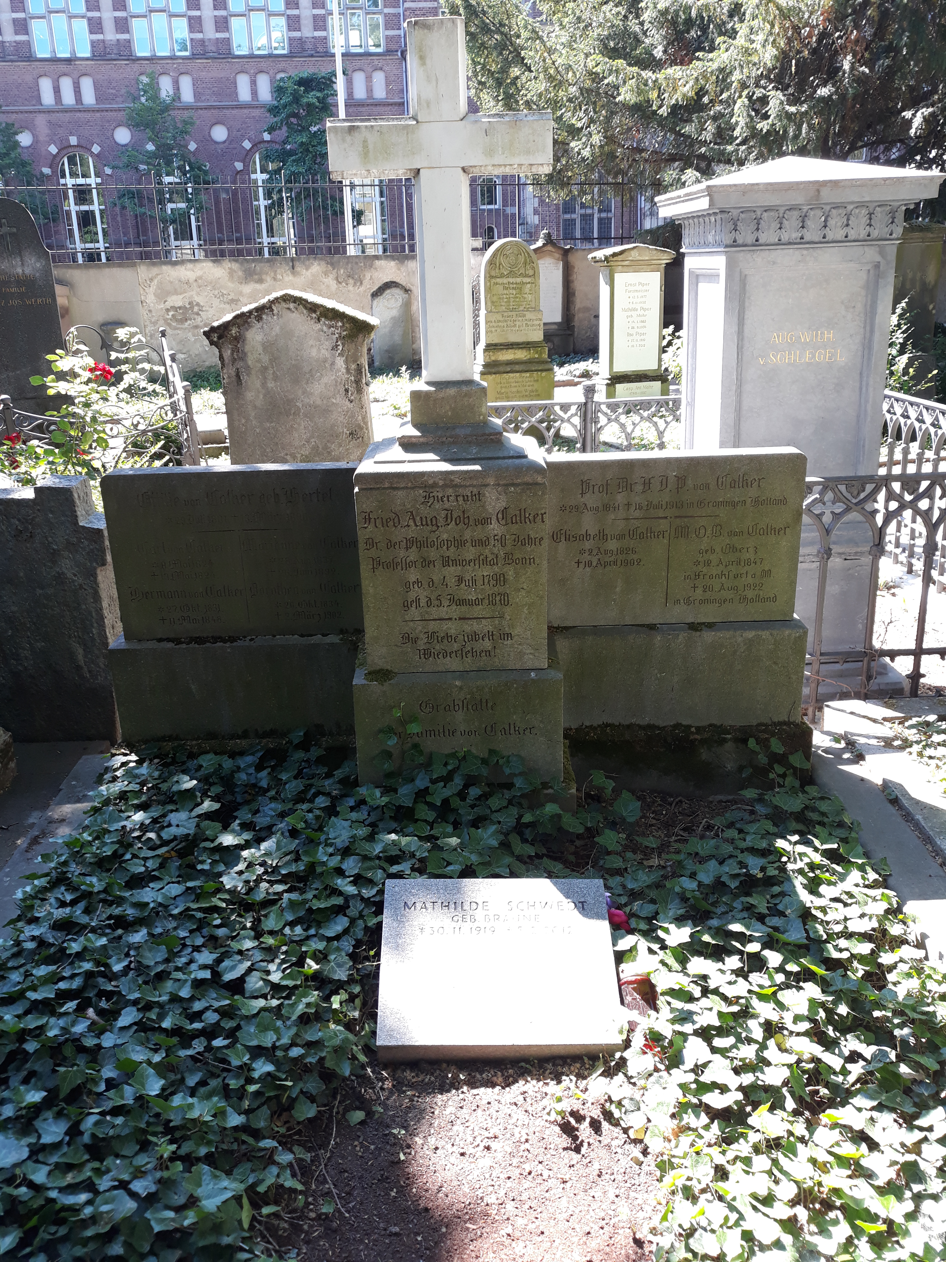 Das Familiengrab des deutschen Philosophen Friedrich August Johann van Calker auf dem Alten Friedhof Bonn.